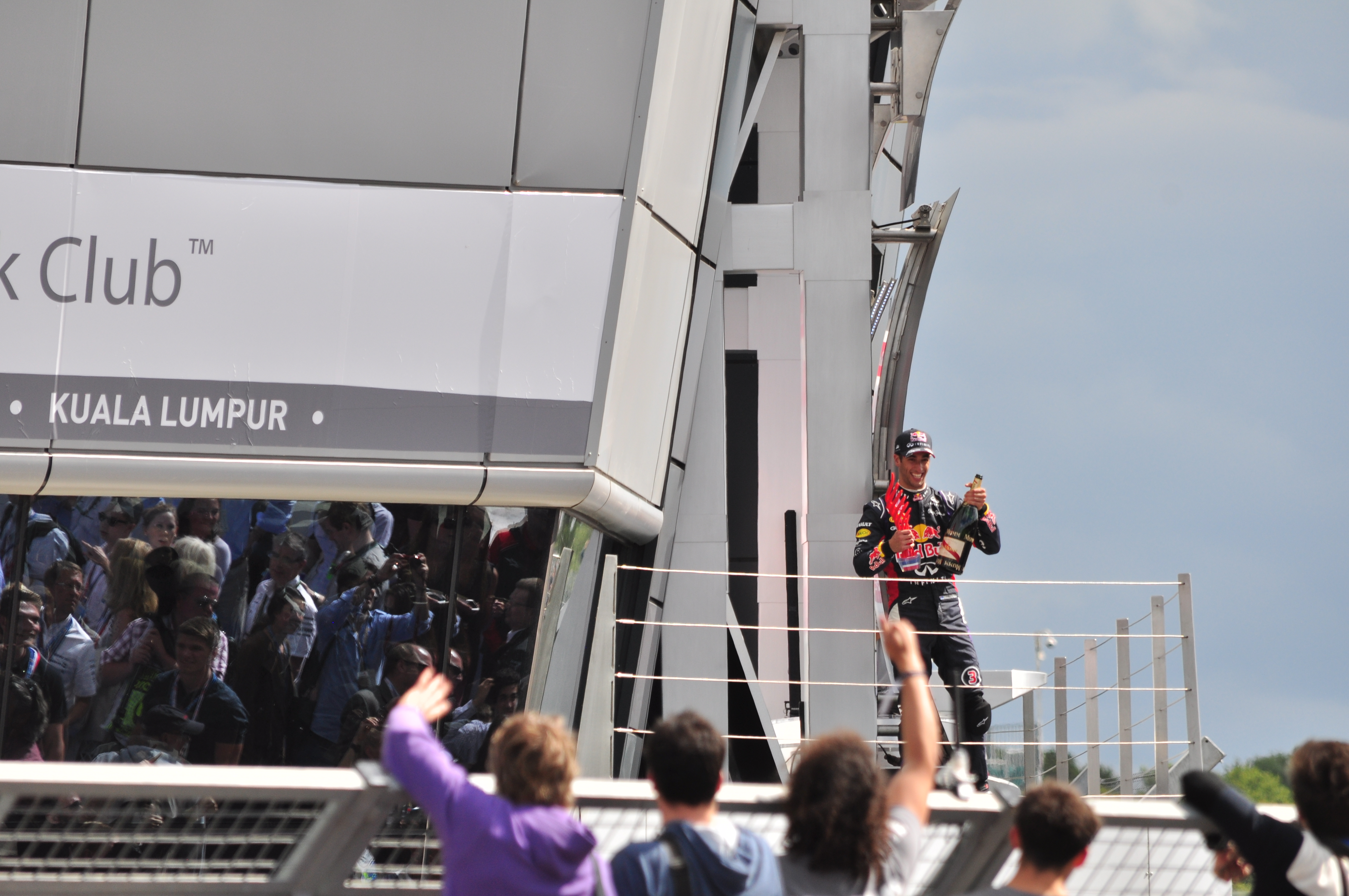 Always smiling...